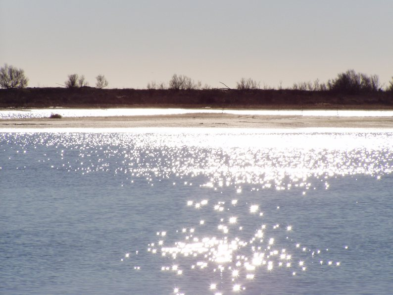 Foto della Laguna del Mort vista dalla riva di Eraclea; Foto personale; Data: 16 agosto 2006